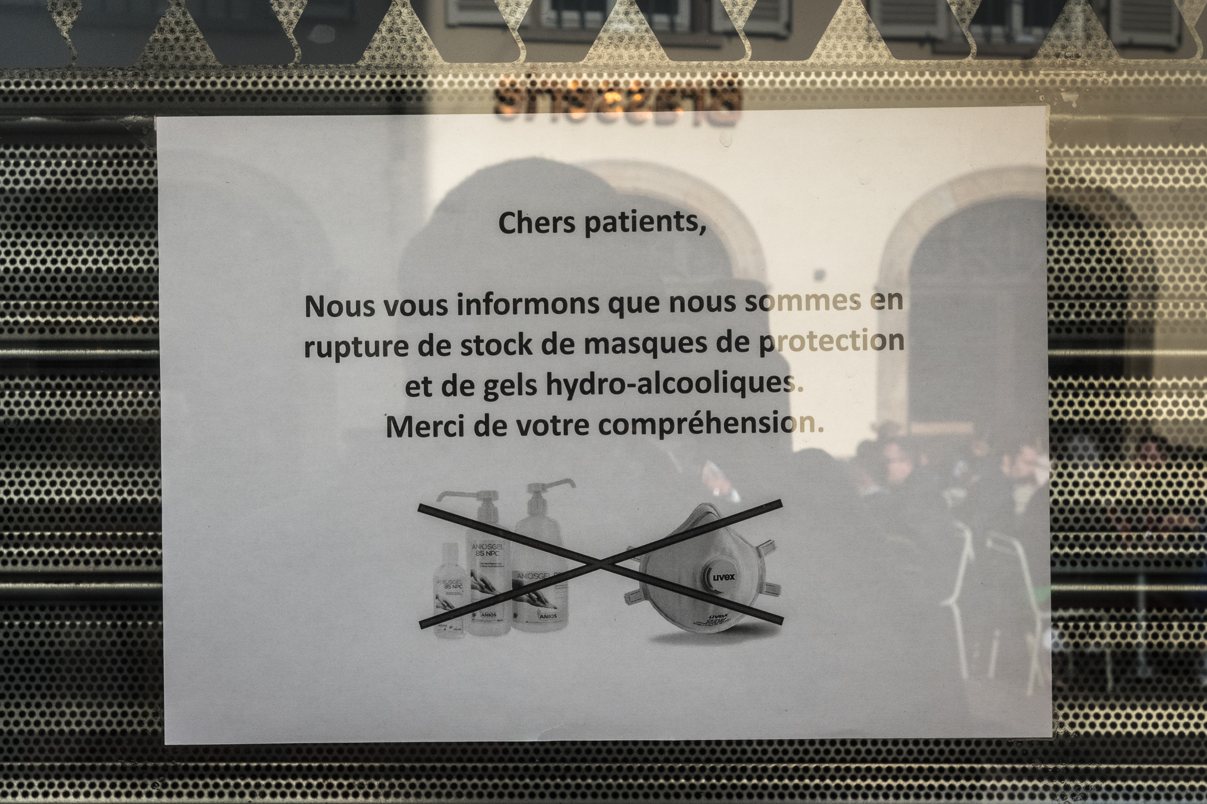 Affichette annonçant la rupture de stock de masques et de gel hydro-alcoolique dans une pharmacie suite à l'épidémie Covid-19 à Strasbourg 1er mars 2020